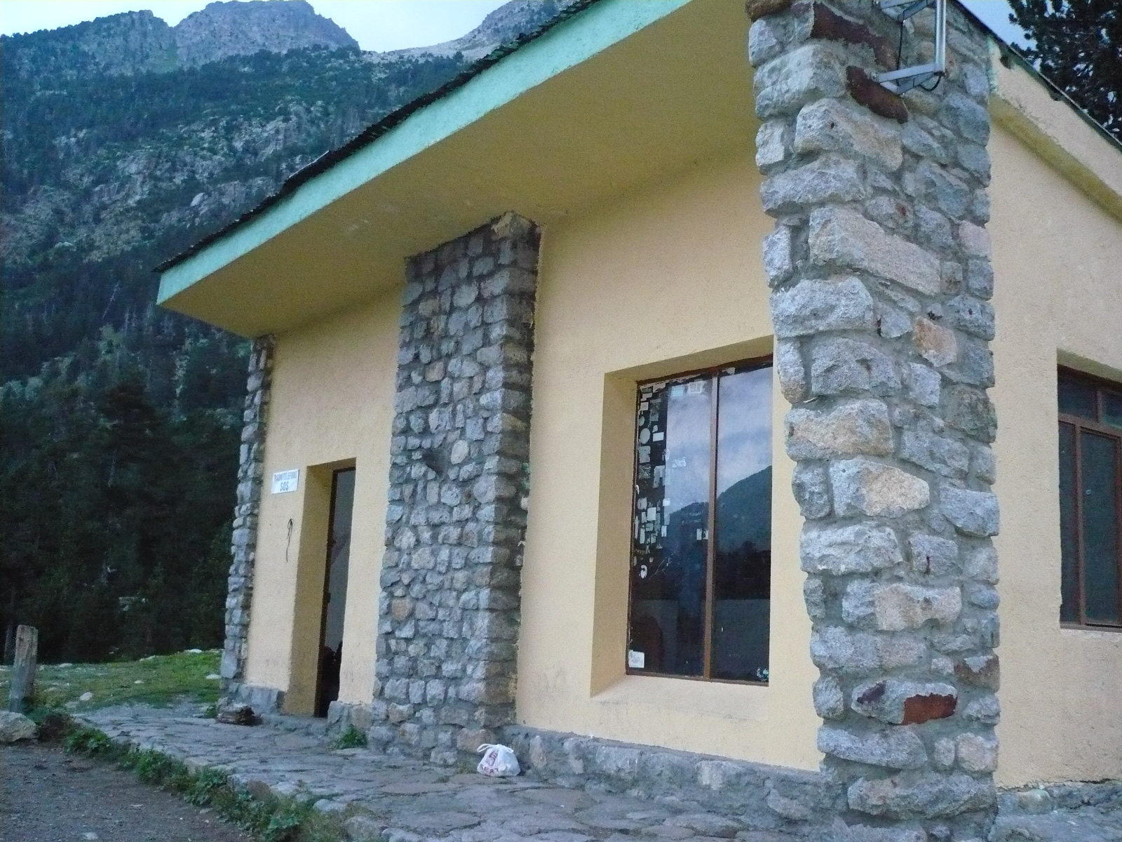 En la cabecera de Vallibierna, a casi 2.000 metros de altitud se encuentra este refugio, en las confluencias de los barrancos de Vallibierna y Coronas.